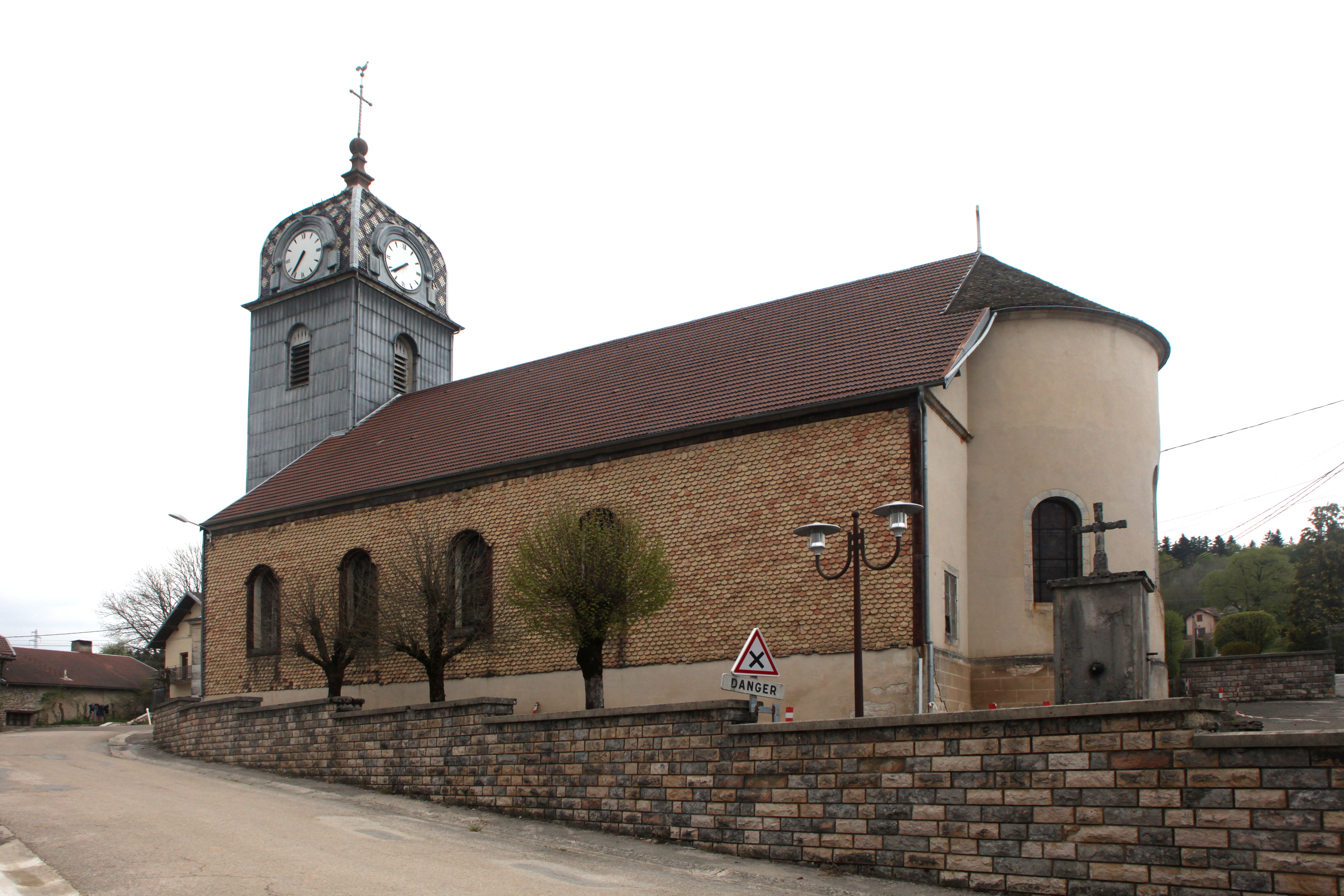 Église de Gevresin (Doubs).